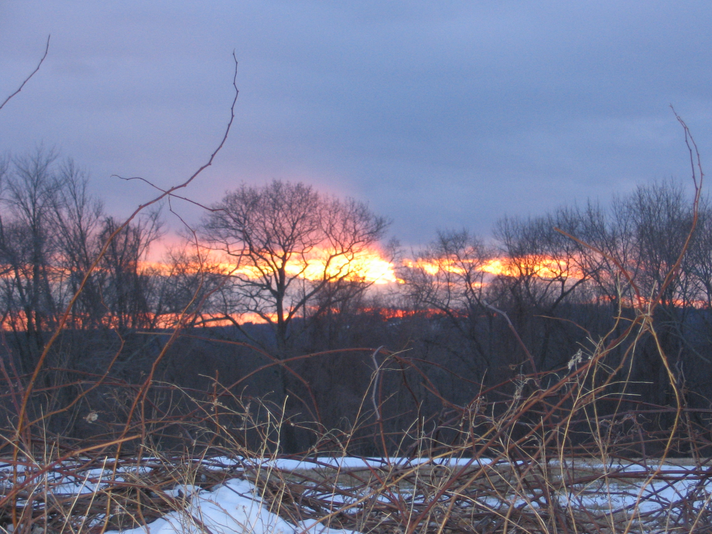 Angel Road